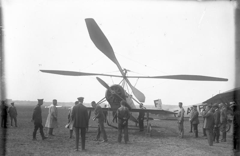 Das Windmühlen-Flugzeug des Spaniers de la Cierva ist auf dem Central-Flughafen in Berlin-Tempelhof eingetroffen! Das spanische Schraubenflugzeug auf dem Tempelhofer Feld in Berlin.